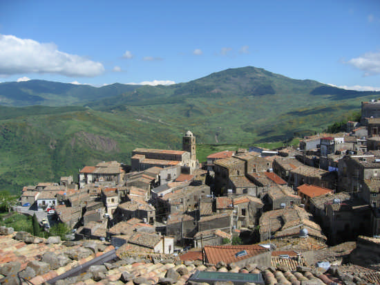 Veduta dal "Castello" di Mistretta: Chiesa di San Nicola e paesaggio montano